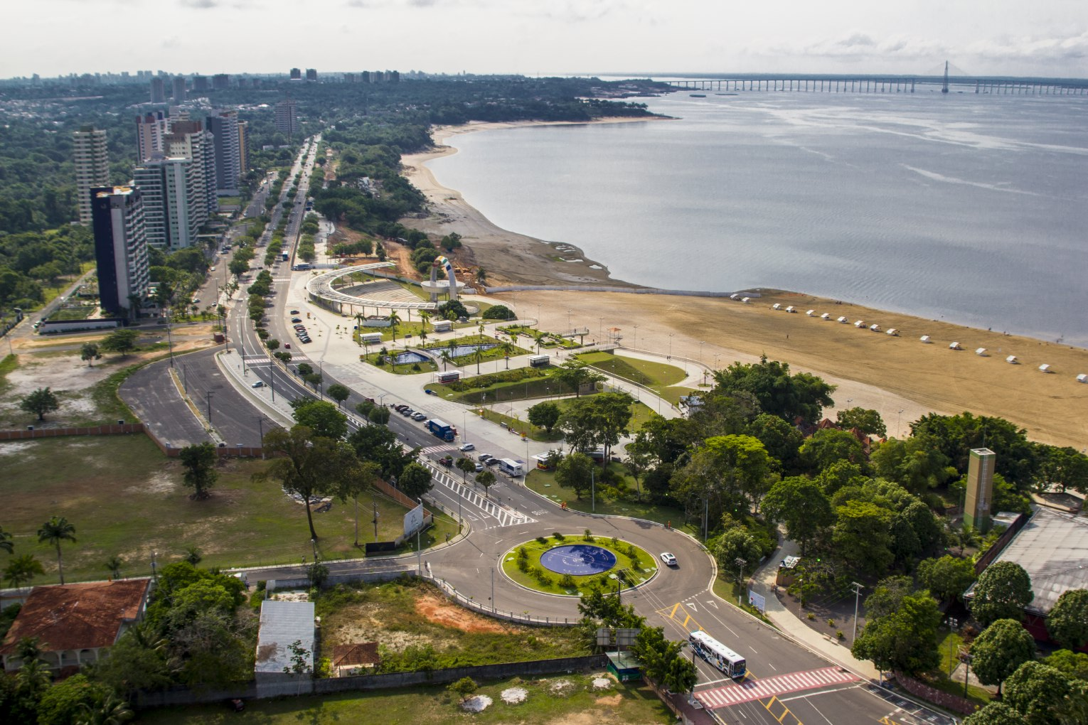 Praia da Ponta Negra, Manaus - Amazonas